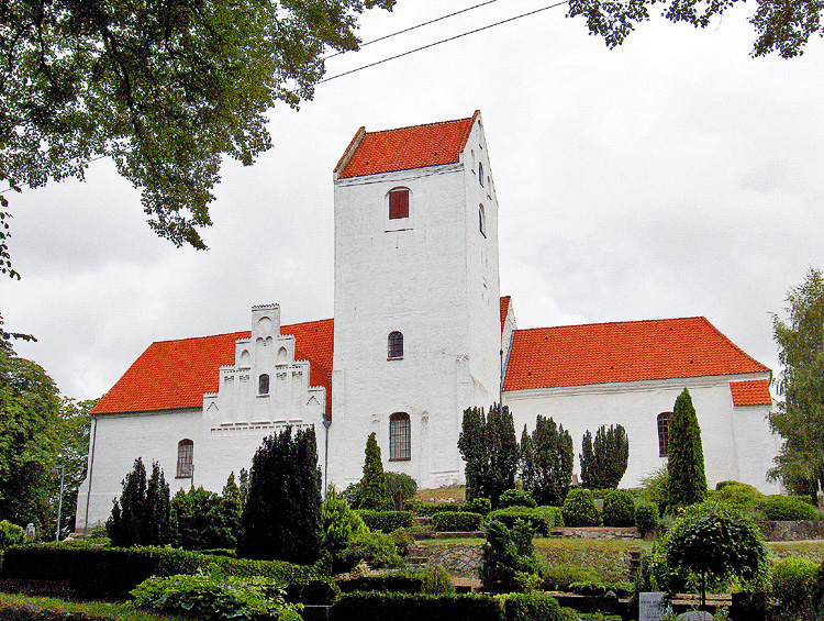 fra syd